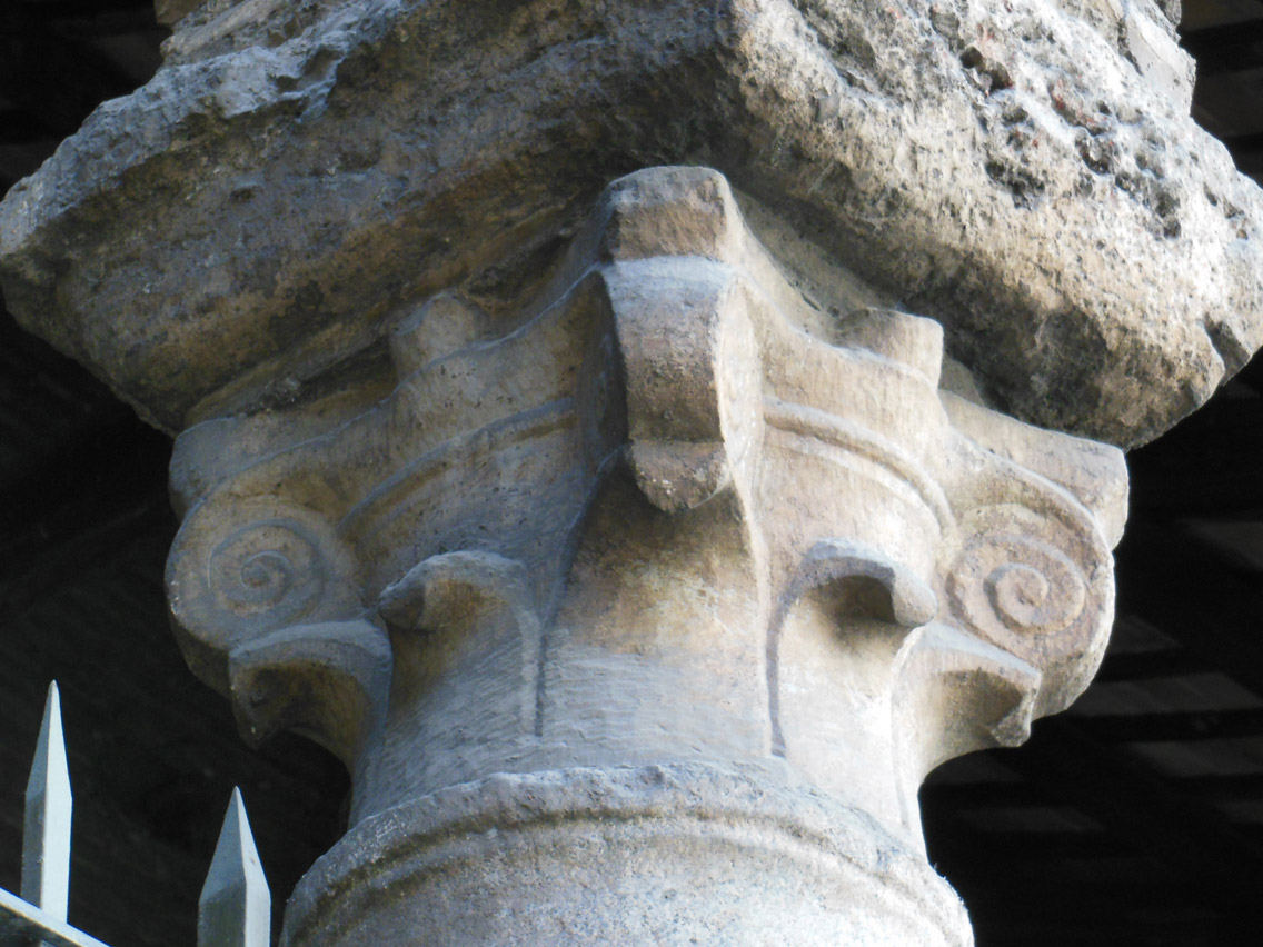 Roma, chiesa di San Vitale (via Nazionale), portico in facciata, capitello composito a foglie lisce nelle arcate del portico